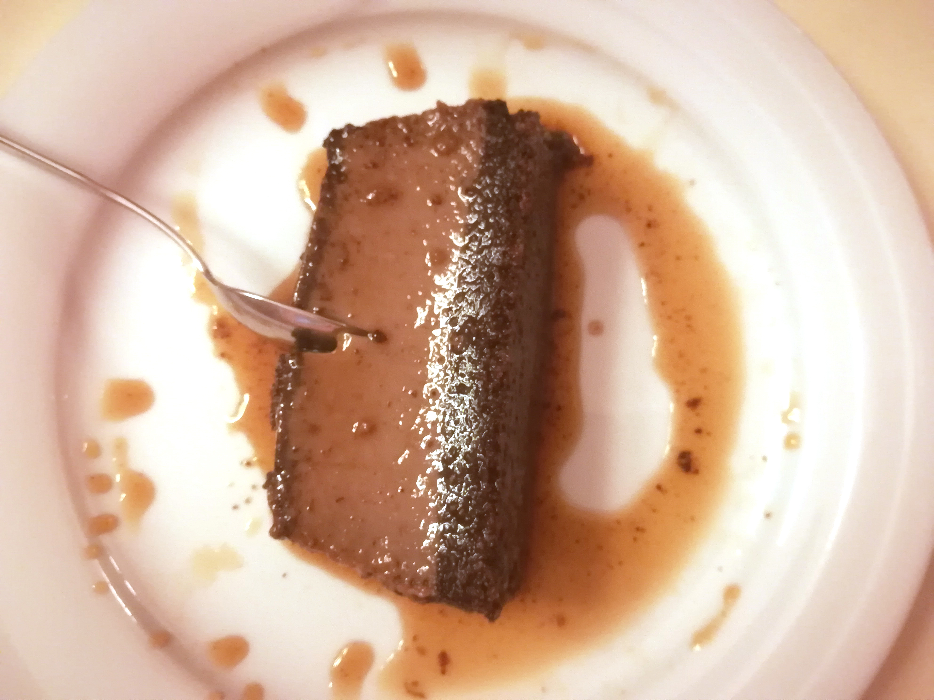 Un bonet, dessert typique piémontais